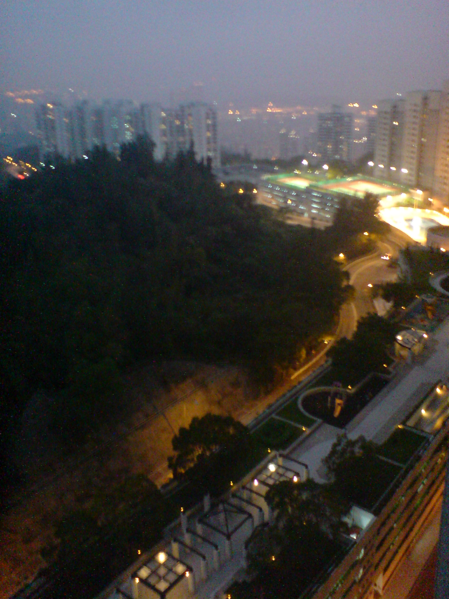 Wonderland Villas Night View